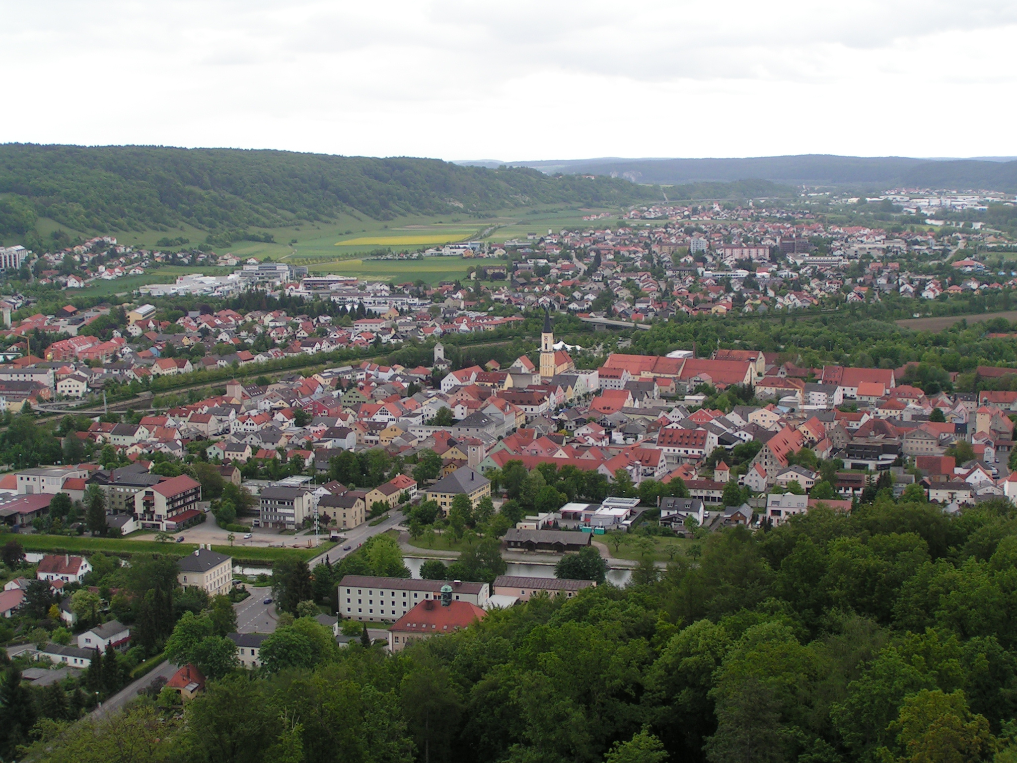 Kelheim und Bauersiedlung von der Befreiungshalle aus